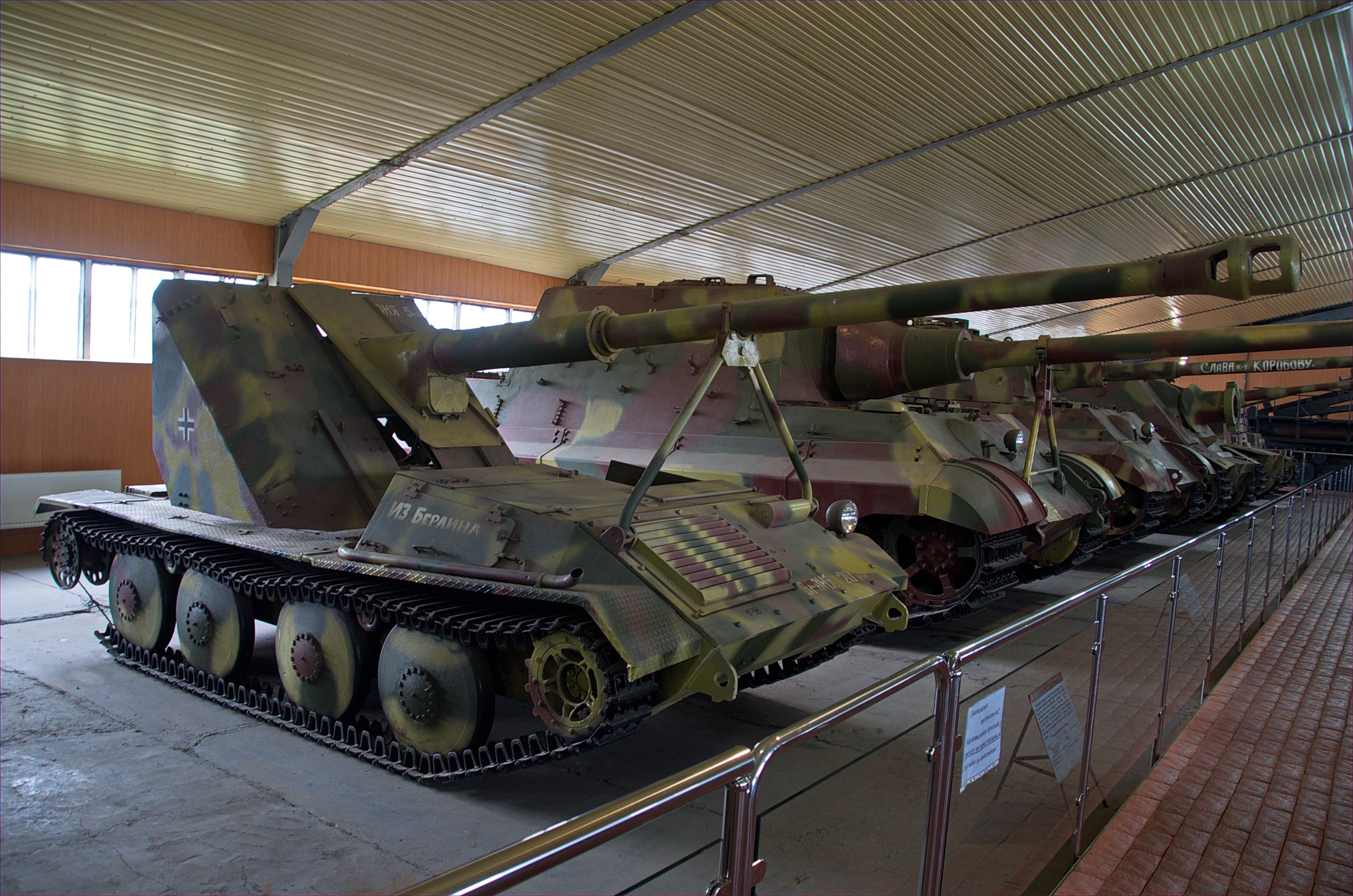 0609 - Moskau 2015 - Panzermuseum Kubinka